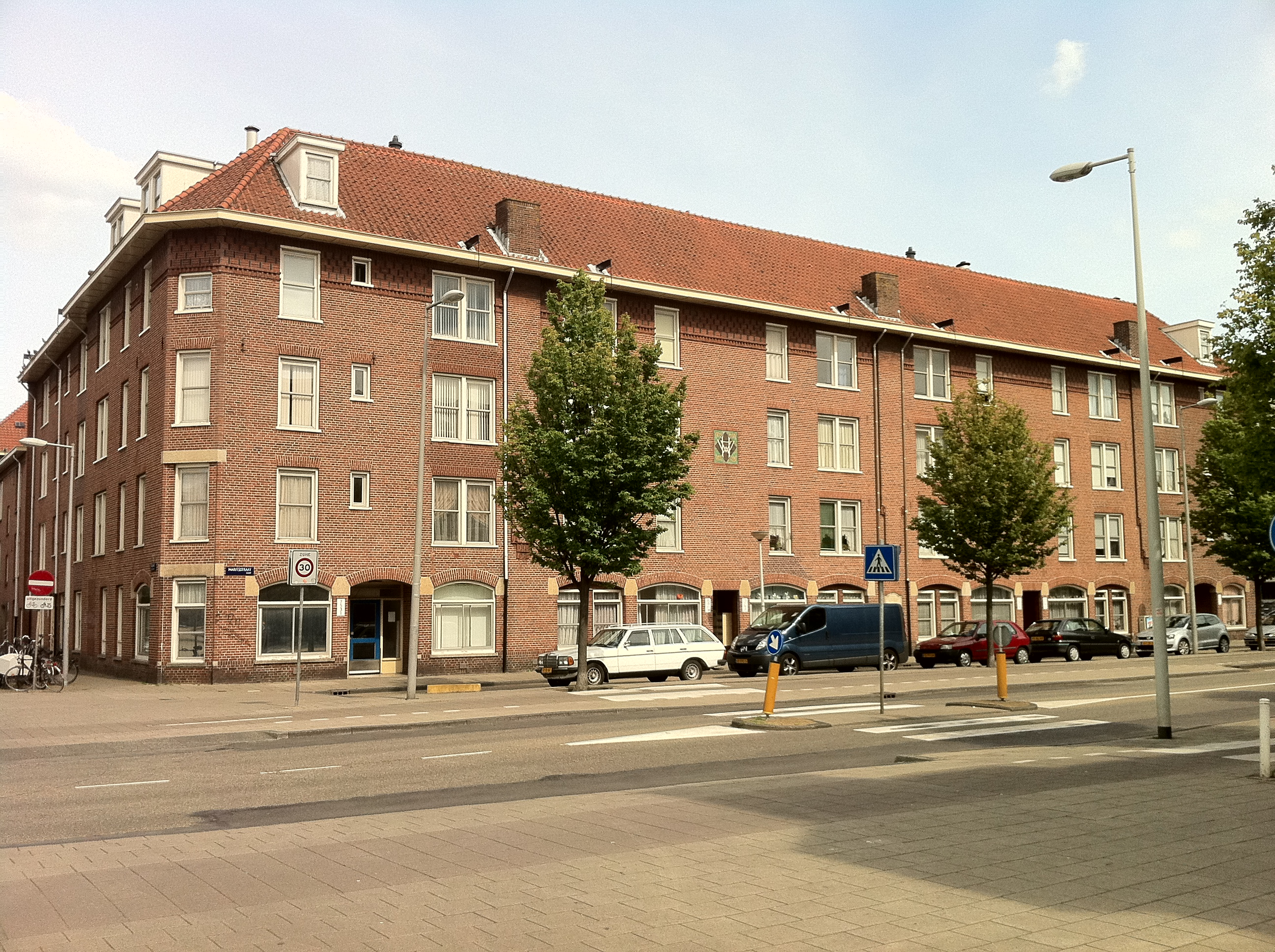 Eerste blok arbeiderswoningen van Bouwfonds Handwerkers Vriendenkring in Transvaalbuurt aan de Maritzstraat Amsterdam